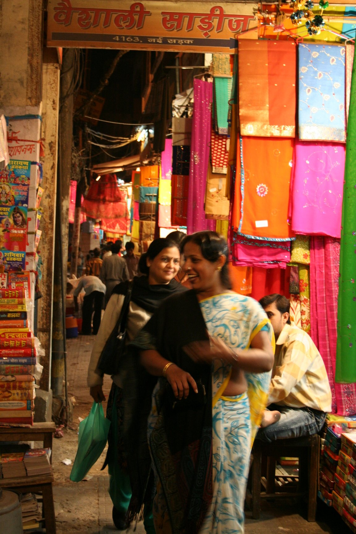 Nai Sarak Saree Shops